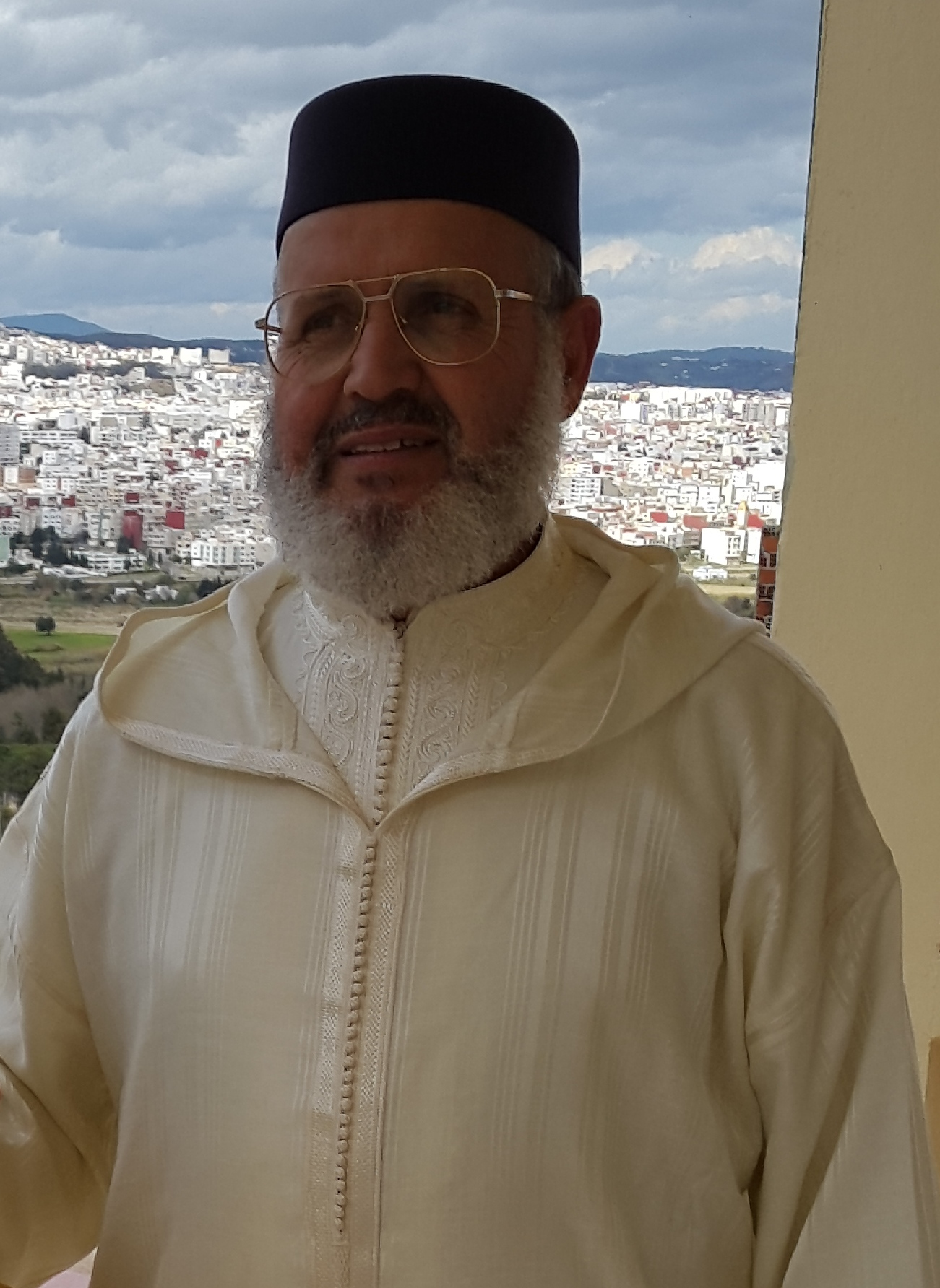 صورة للدكتور عبد الله الشارف من شرفة منزله بتطوان